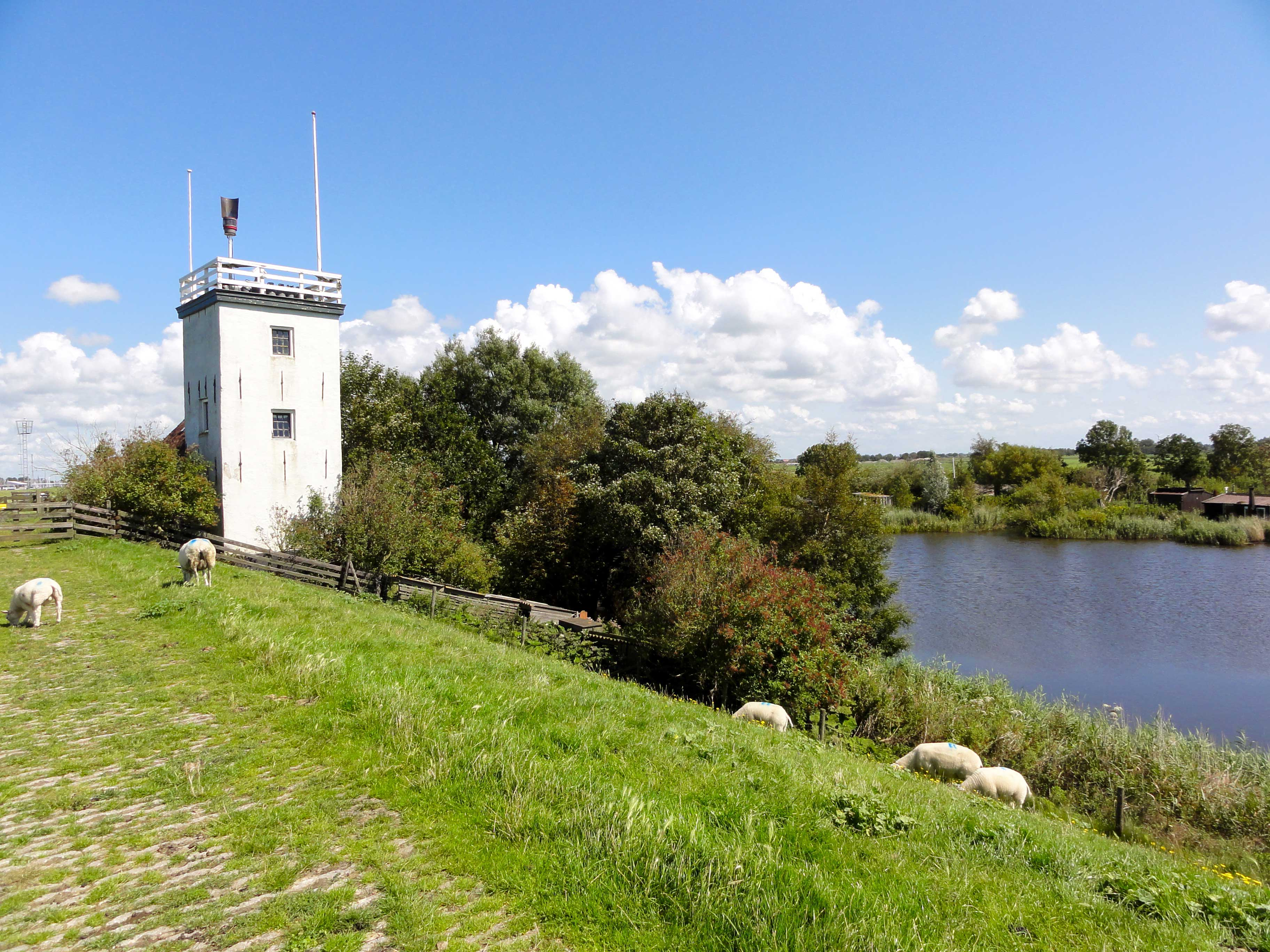 It Toarntje nabij Workum